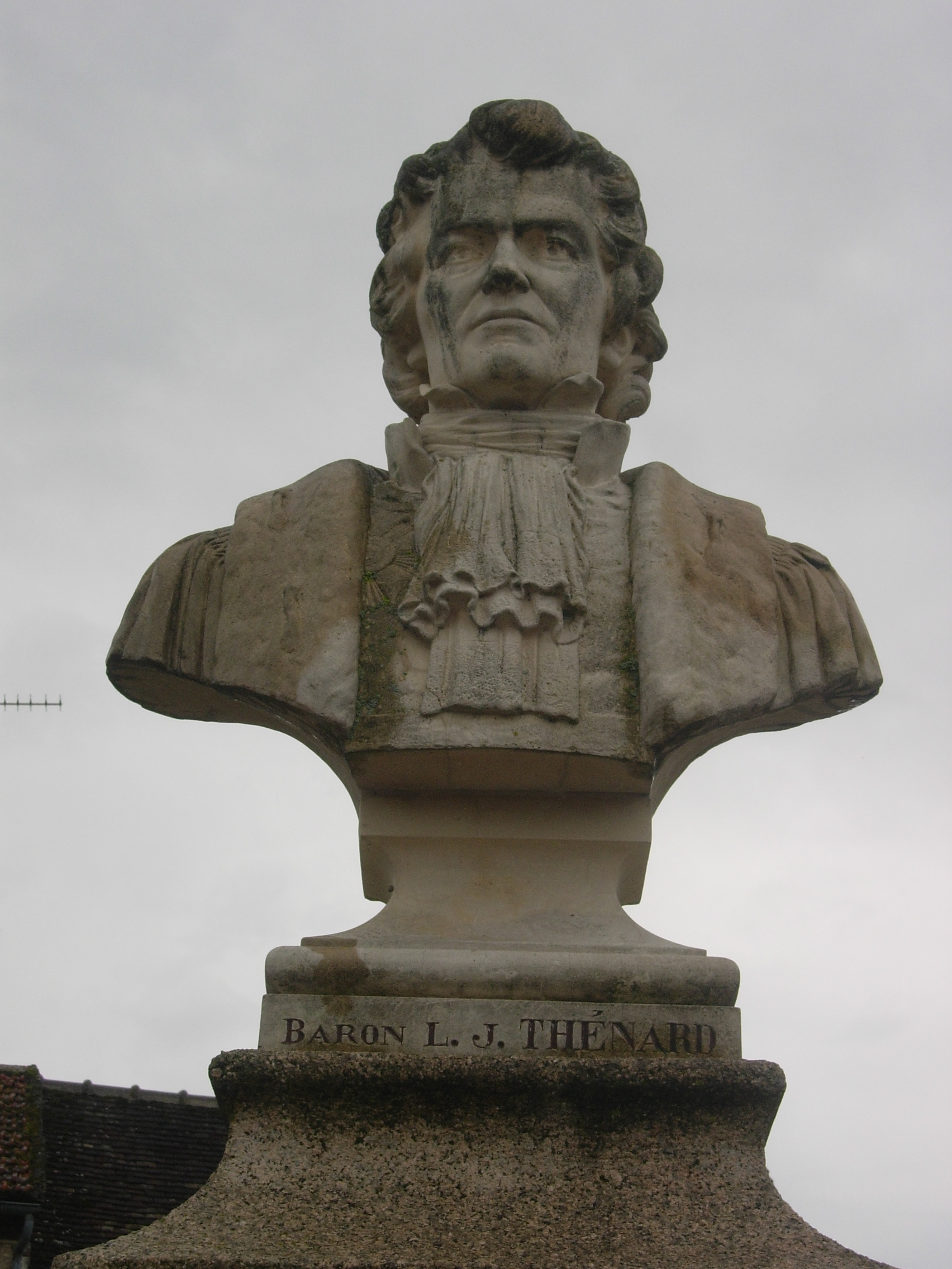 Buste du Baron Thénard, la Louptière-Thénard (Aube)